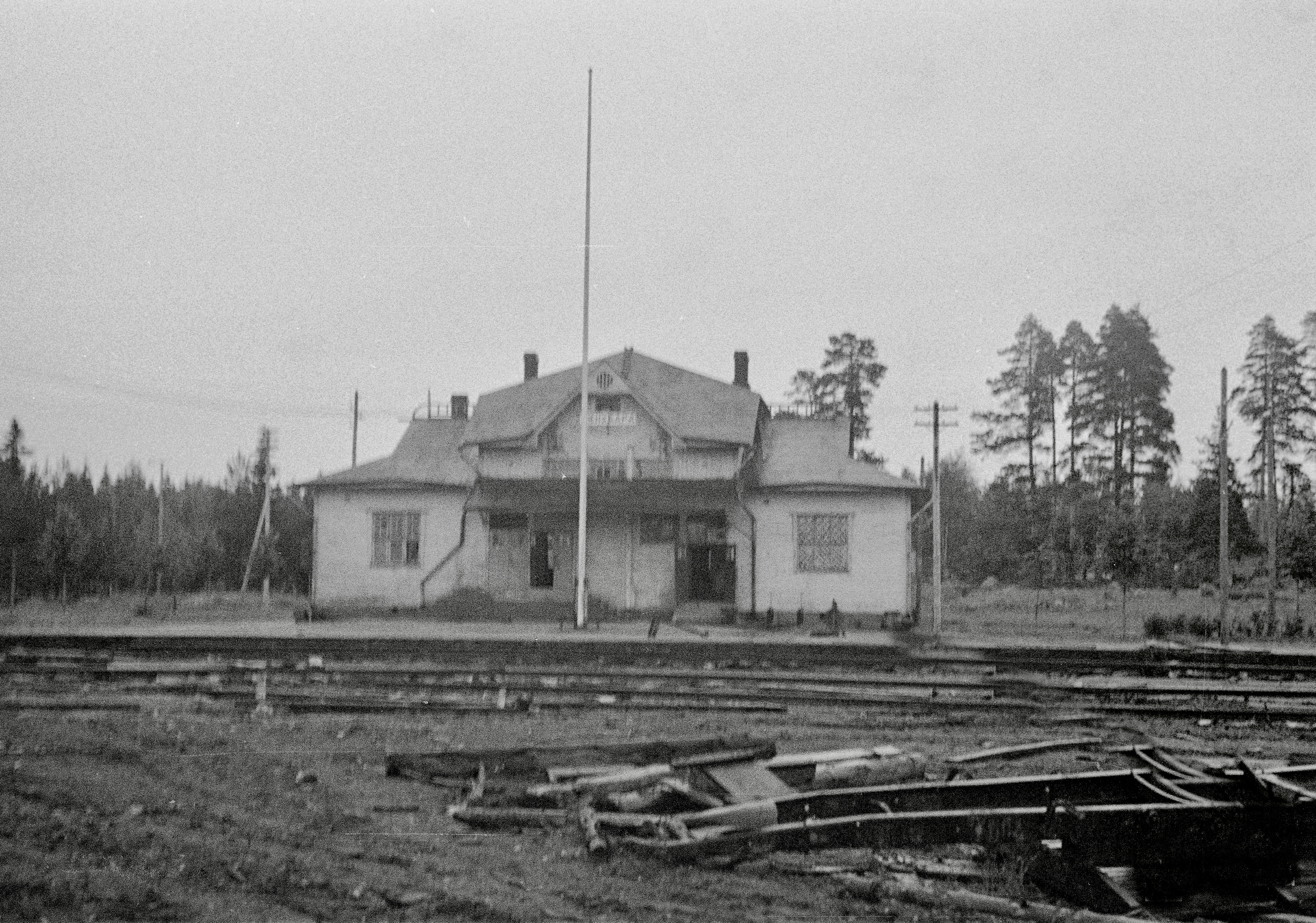 Тиенхаара